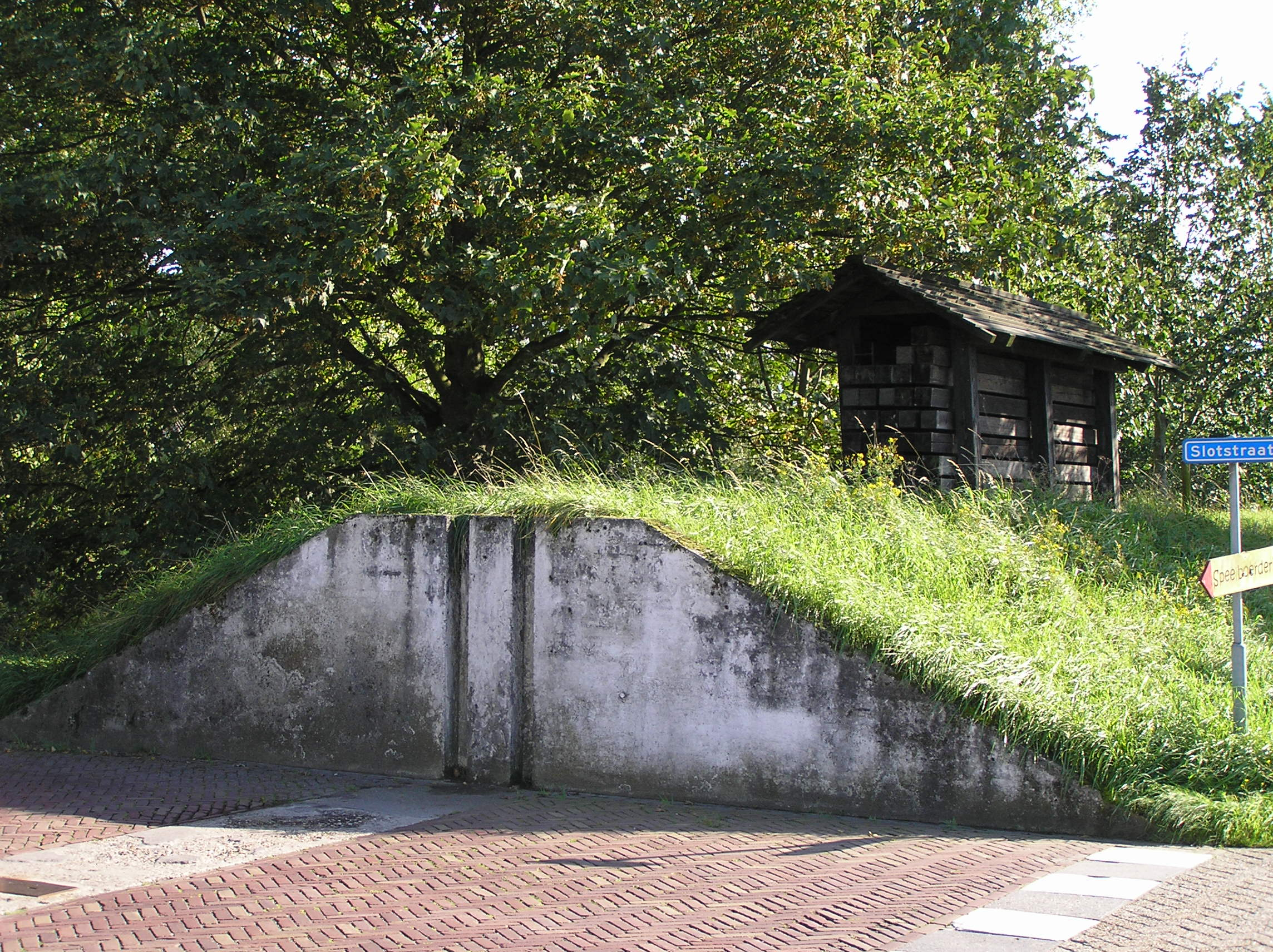 Coupure in de dijk bij 's-Heer Arendskerke ten behoeve van het trein- en wegverkeer van rond 1872. Op de dijk naast de coupure staat een schotbalkhuisje.